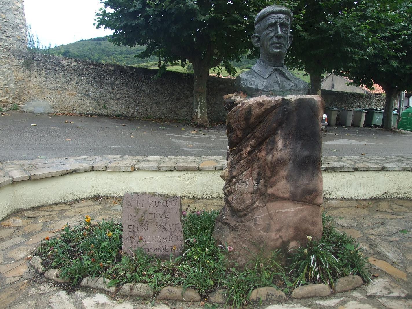 Busto de Rogelio González Vinoles, el Zurdo de Bielva, situado en la bolera de Bielva, Cantabria, España.